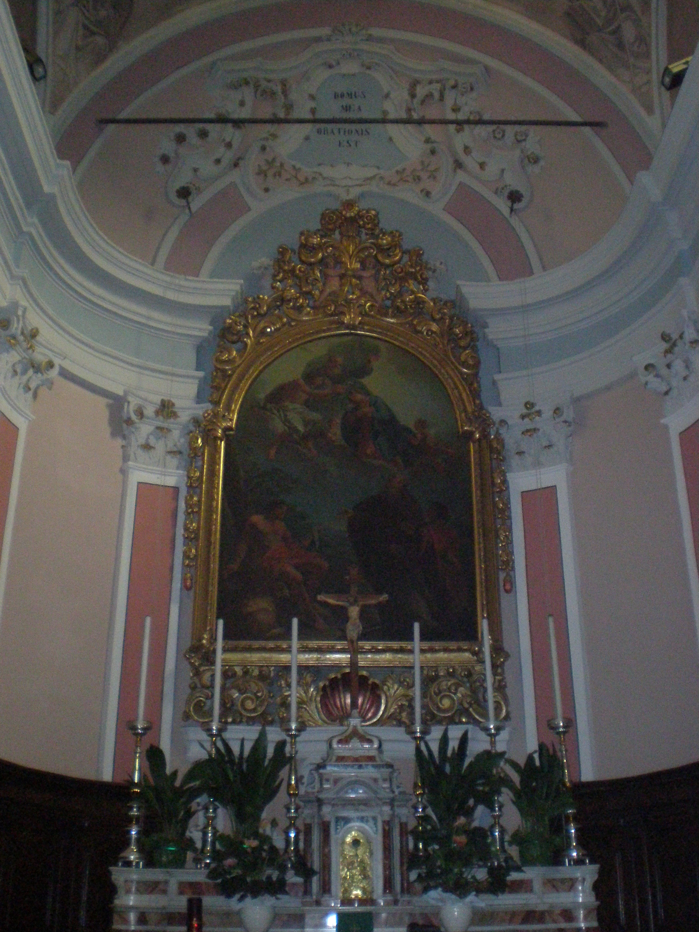 Pala di Francesco Savanni conservata nella chiesa parrocchiale di Sant'Antonio abate a Magasa in provincia di Brescia, Italia